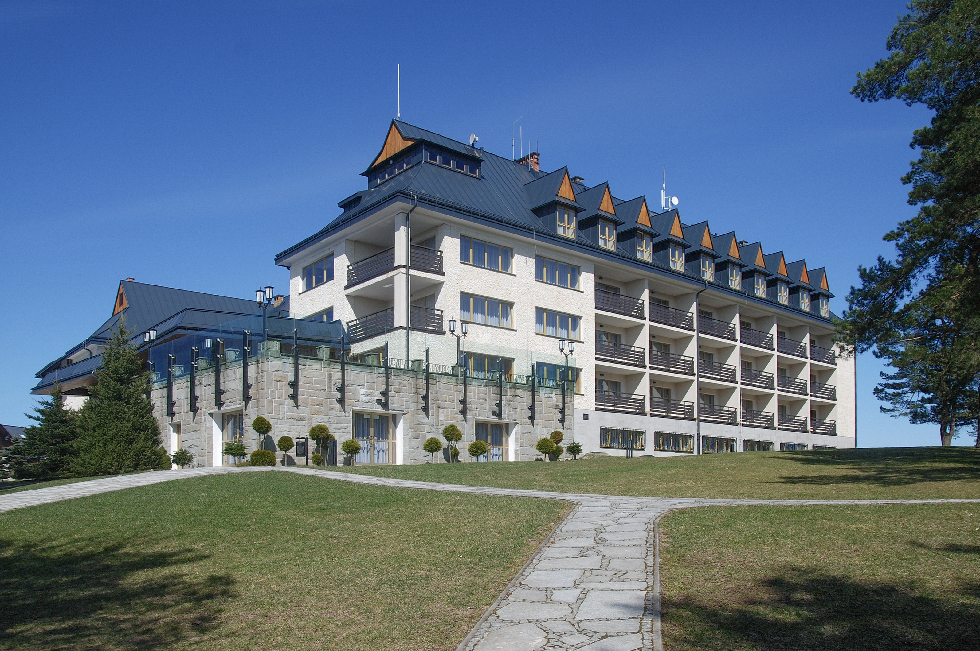 Jamna Górna